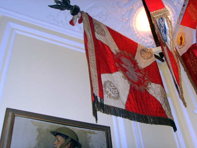 eksponaty Muzeum im. Sikorskiego w Londynie. Z lewej: sztandar 2 Warszawskej Dywizji Pancernej